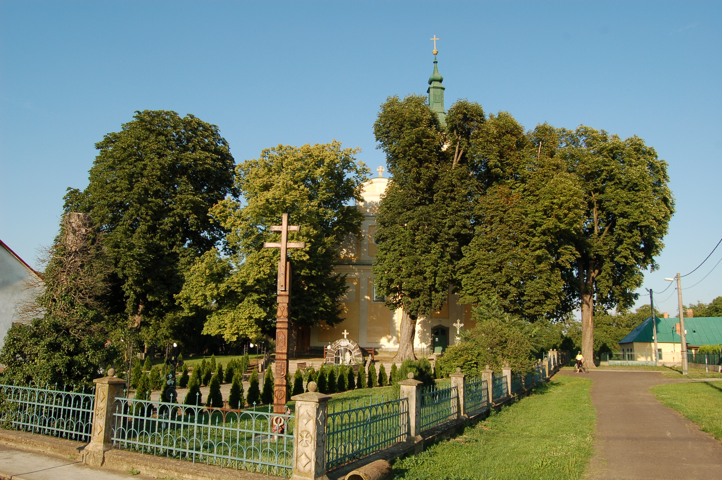 Ruská devant l'égliseSlovenčina: Ruská pred kostolom